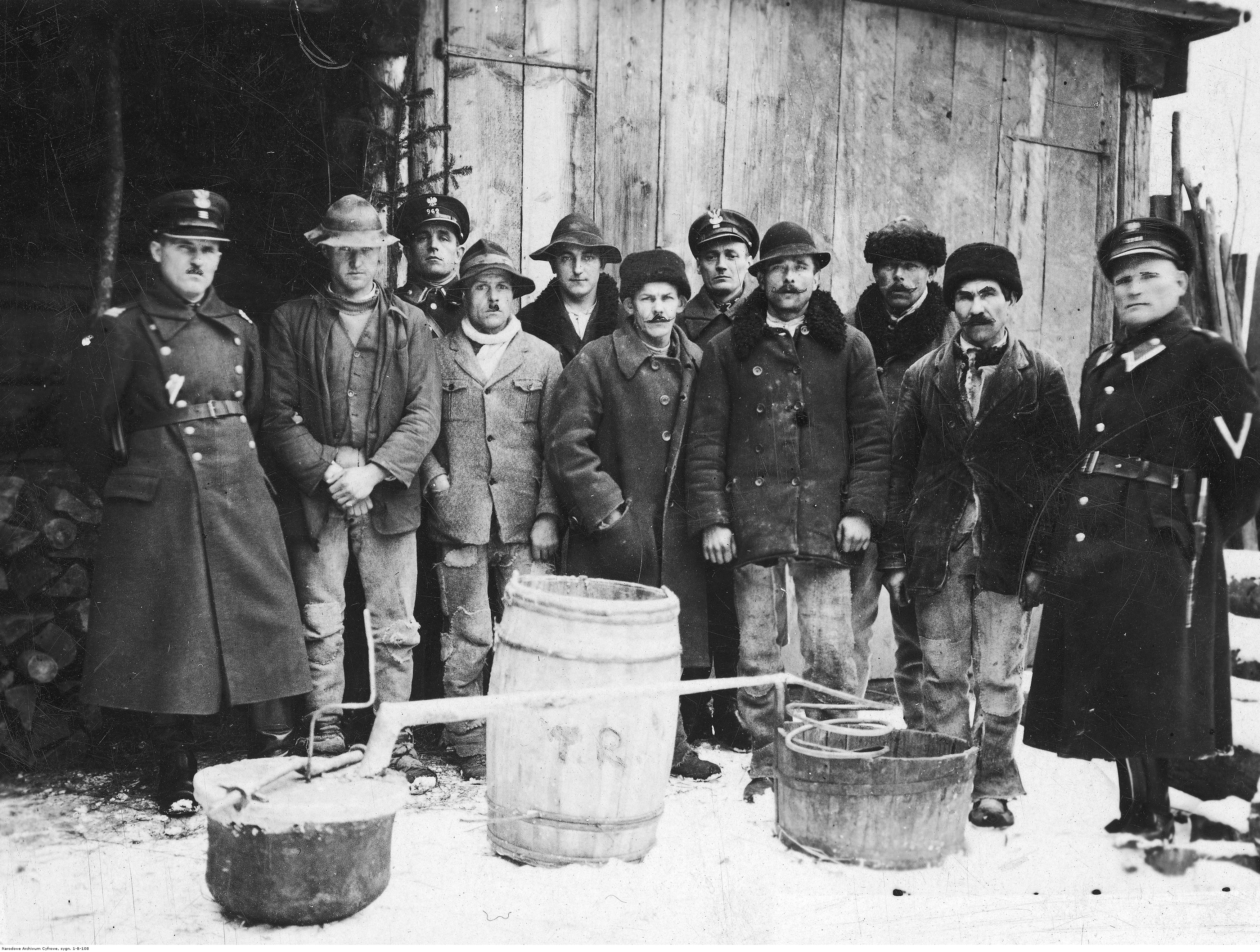 Likwidacja nielegalnej bimbrowni przez funkcjonariuszy Policji Państwowej i Straży Granicznej w Krościenku. Funkcjonariusze Policji Państwowej i Straży Granicznej wśród zatrzymanych. Koncern Ilustrowany Kurier Codzienny - Archiwum Ilustracji. Sygnatura: 1-B-108